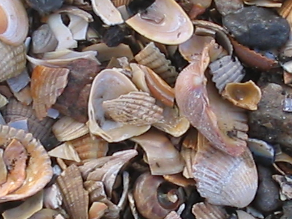 schelpen op voetpad